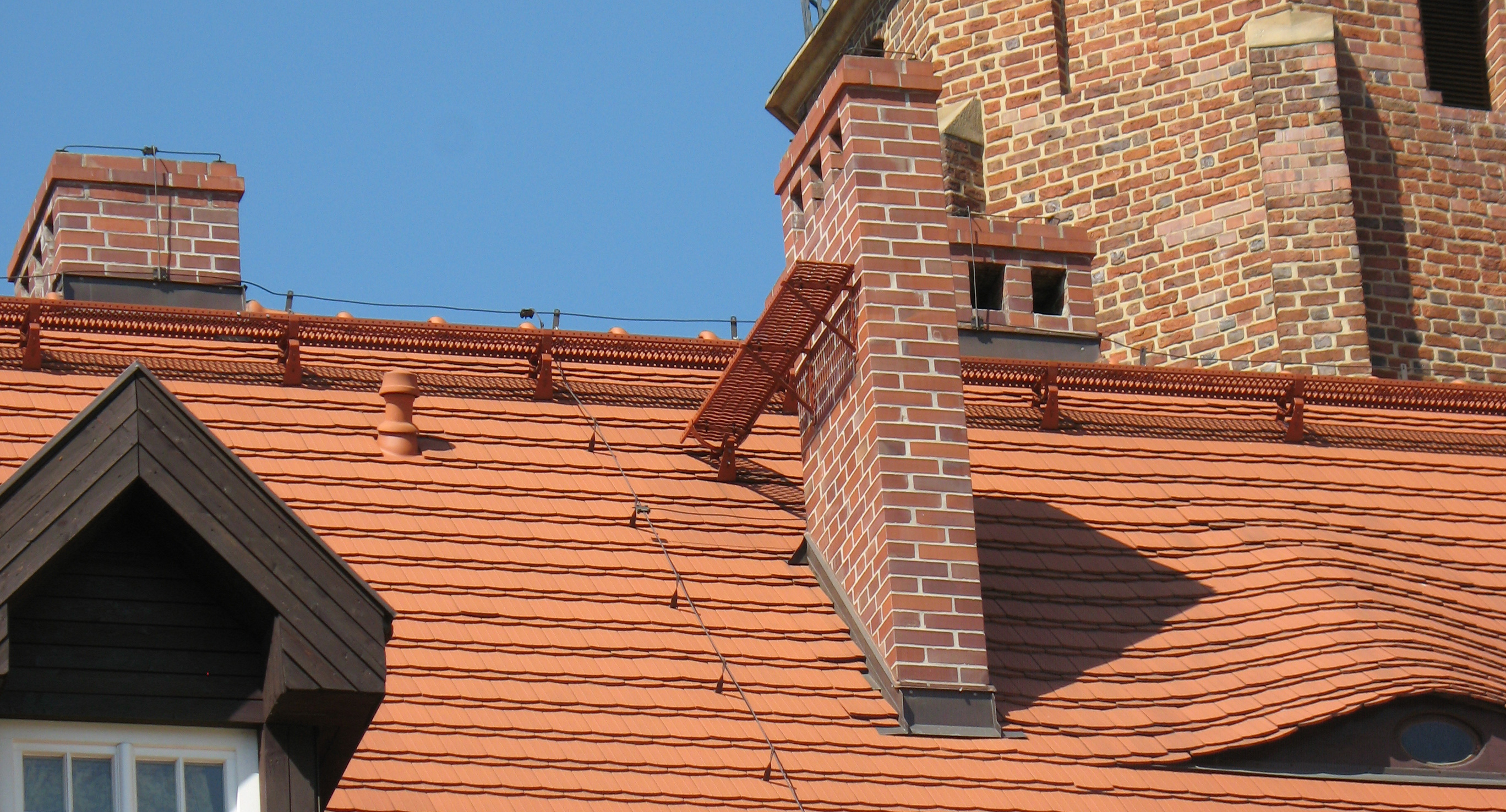 Ławczeka kominiarska przy kominie i wzdłuż kalenicy, Wrocław, Kolegium Europy Wschodniej